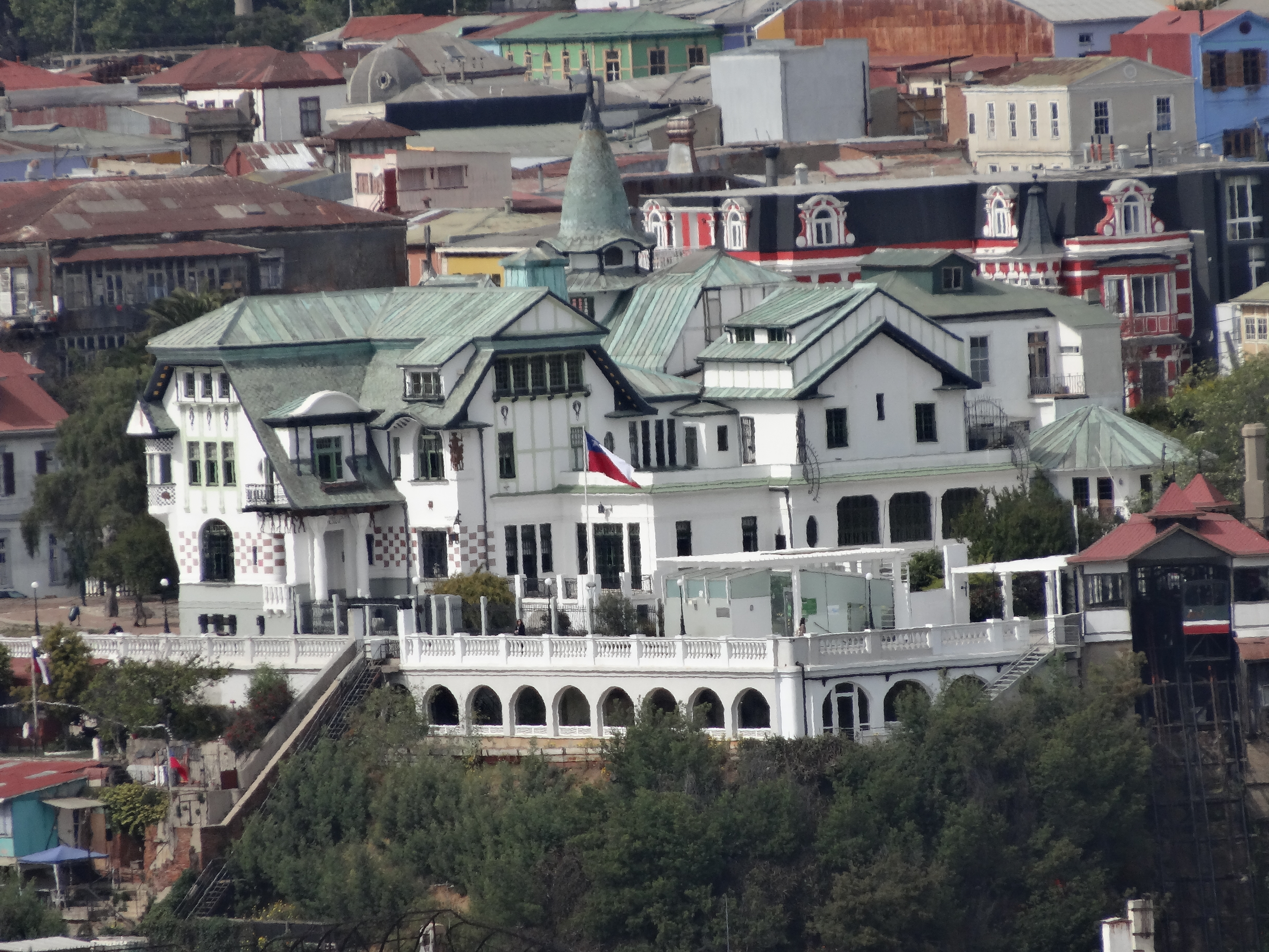 Palacio Baburizza This is a photo of a national monument in Chile: 608